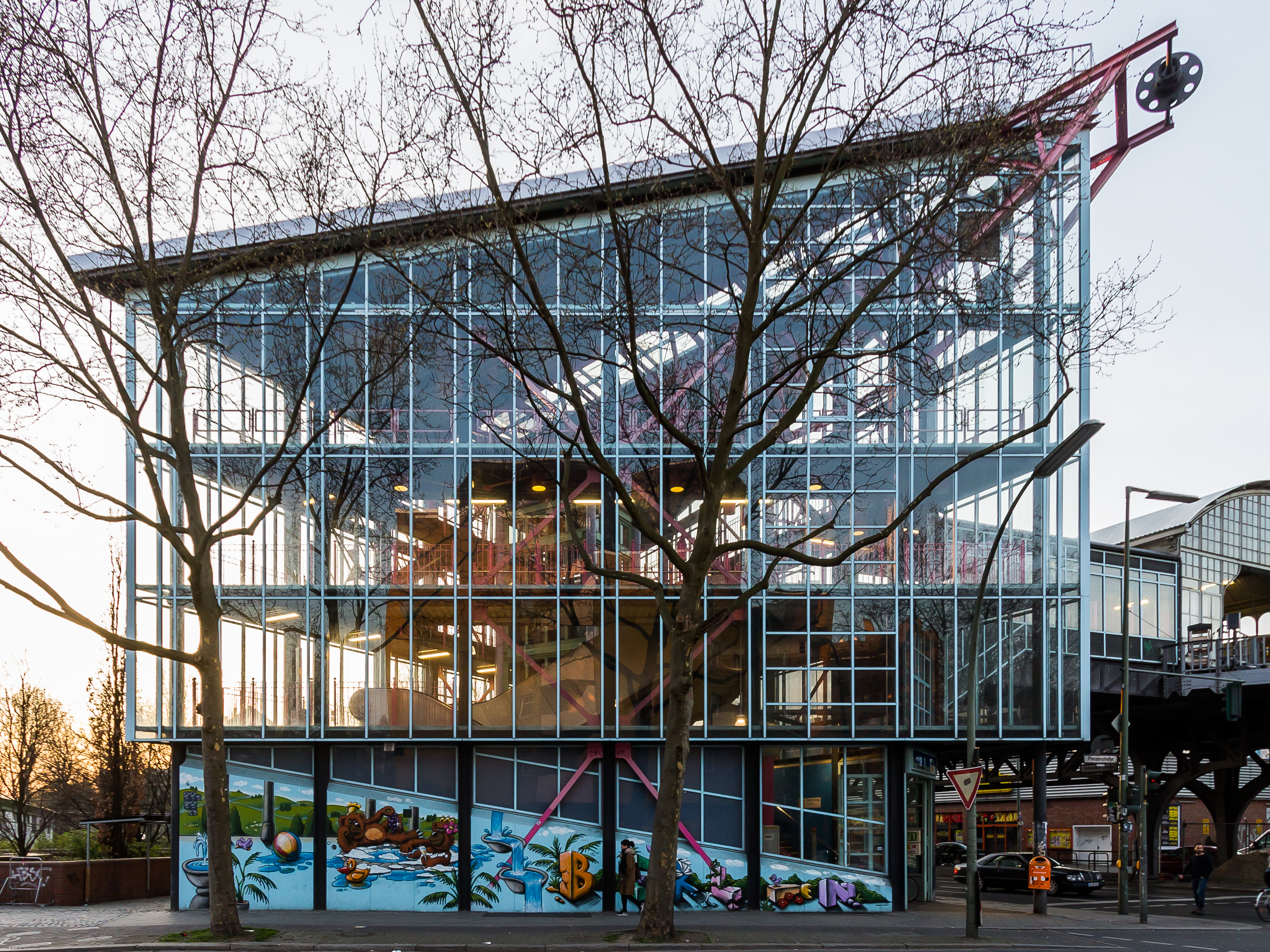 Südzugang U-Bahnhof Prinzenstraße Berlin. Architekt: Wolf-Rüdiger Borchardt. Bauzeit: 1989-1991